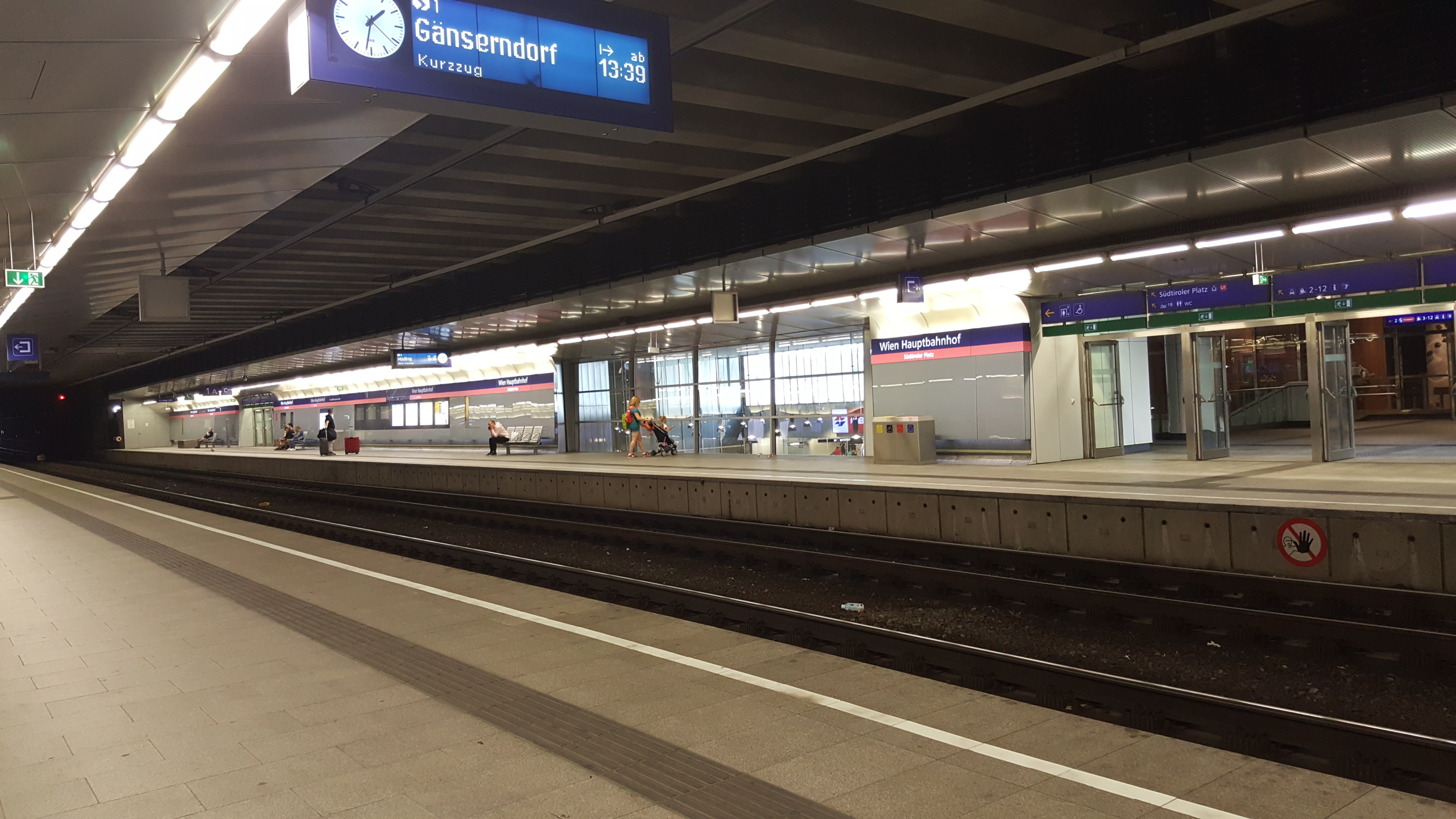 S-Bahnstation Wien Hauptbahnhof (Südtiroler Platz)